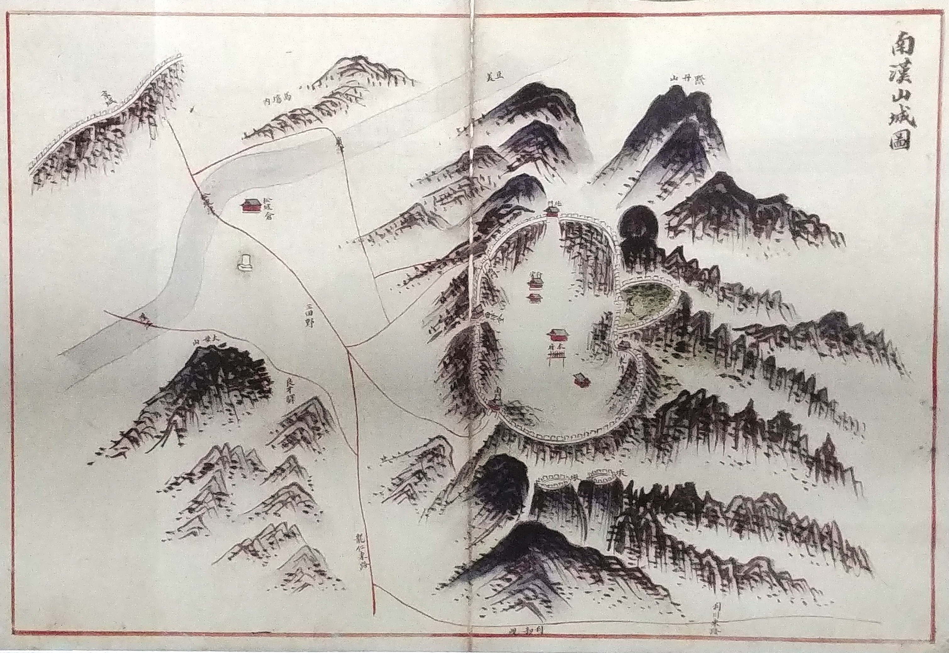 지도에는 남한산성의 동서남북 성문과 서장대 정도가 그려져 있다. 지도에는 행궁과 본부 건물만 그려넣고 나머지는 생략하였다.